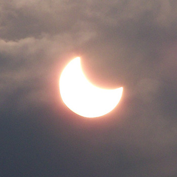 Esta mañana a las 08:45 (más o menos) cuando el eclipse estaba en su mayor extensión